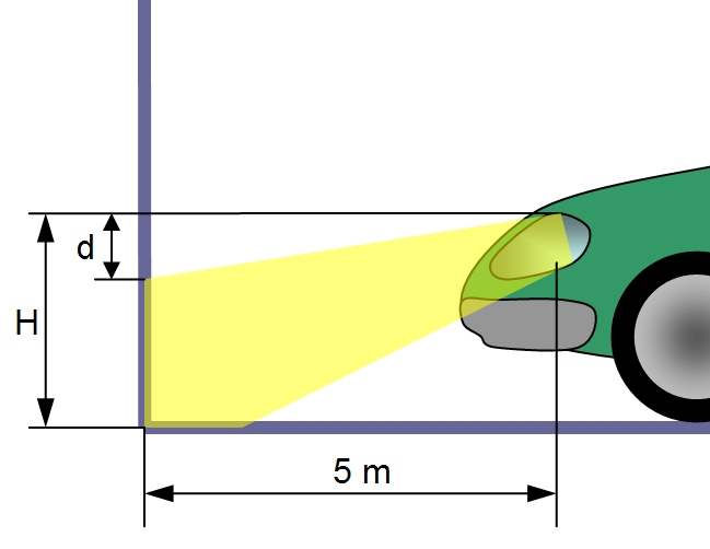 schéma de la procedure de réglage des phares d'une automobile. Valeurs recommandées (mm): H=600 d=100 ; H=650 d=110 ; H=700 d=115 ; H=750 d=125 ; H=800 d=135